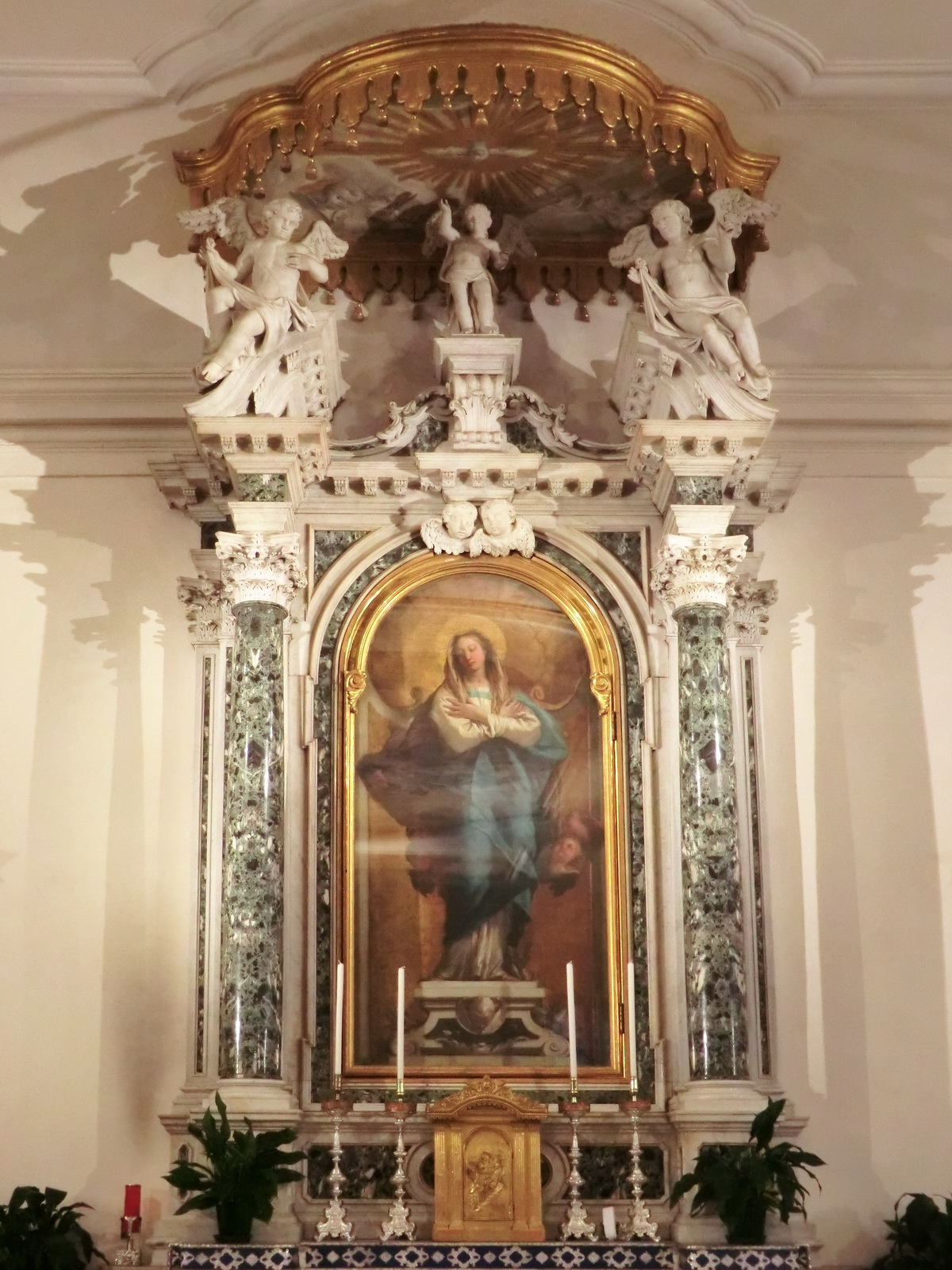 Oratorio della Purità, Udine Native nameOratorio della Purità, UdineLocationUdine, ItalyCoordinates46° 03′ 44.44″ N, 13° 14′ 14.82″ E